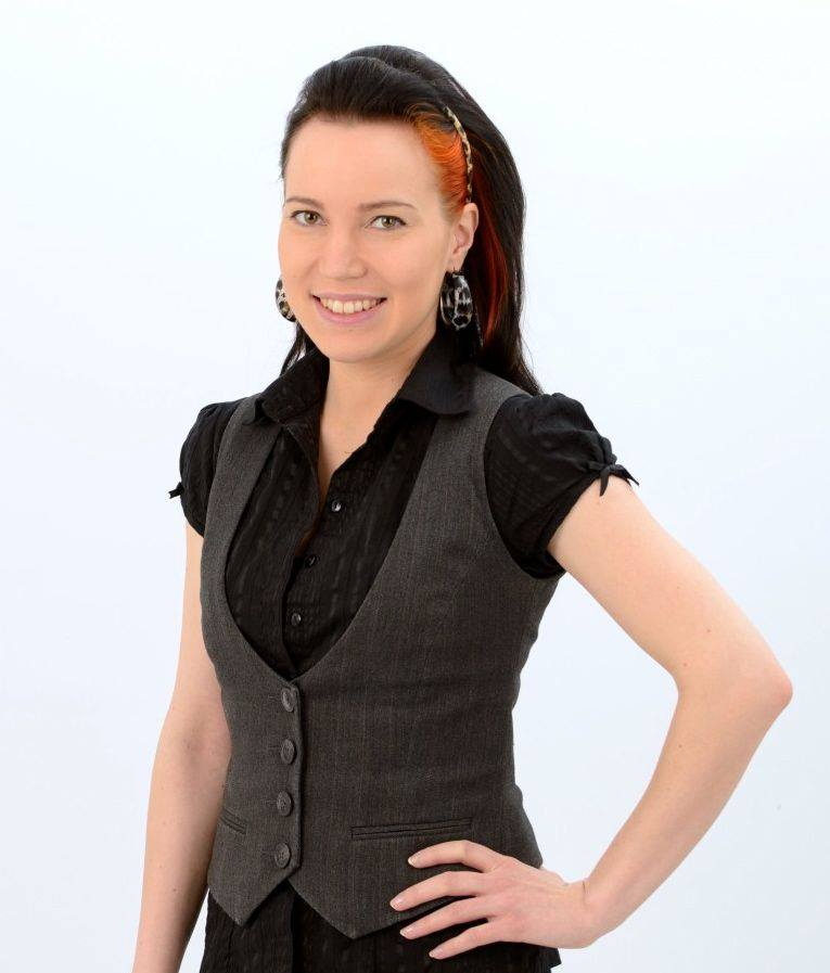 Kristillisdemokraattisten nuorten pääsihteeeri Milka Taivassalo